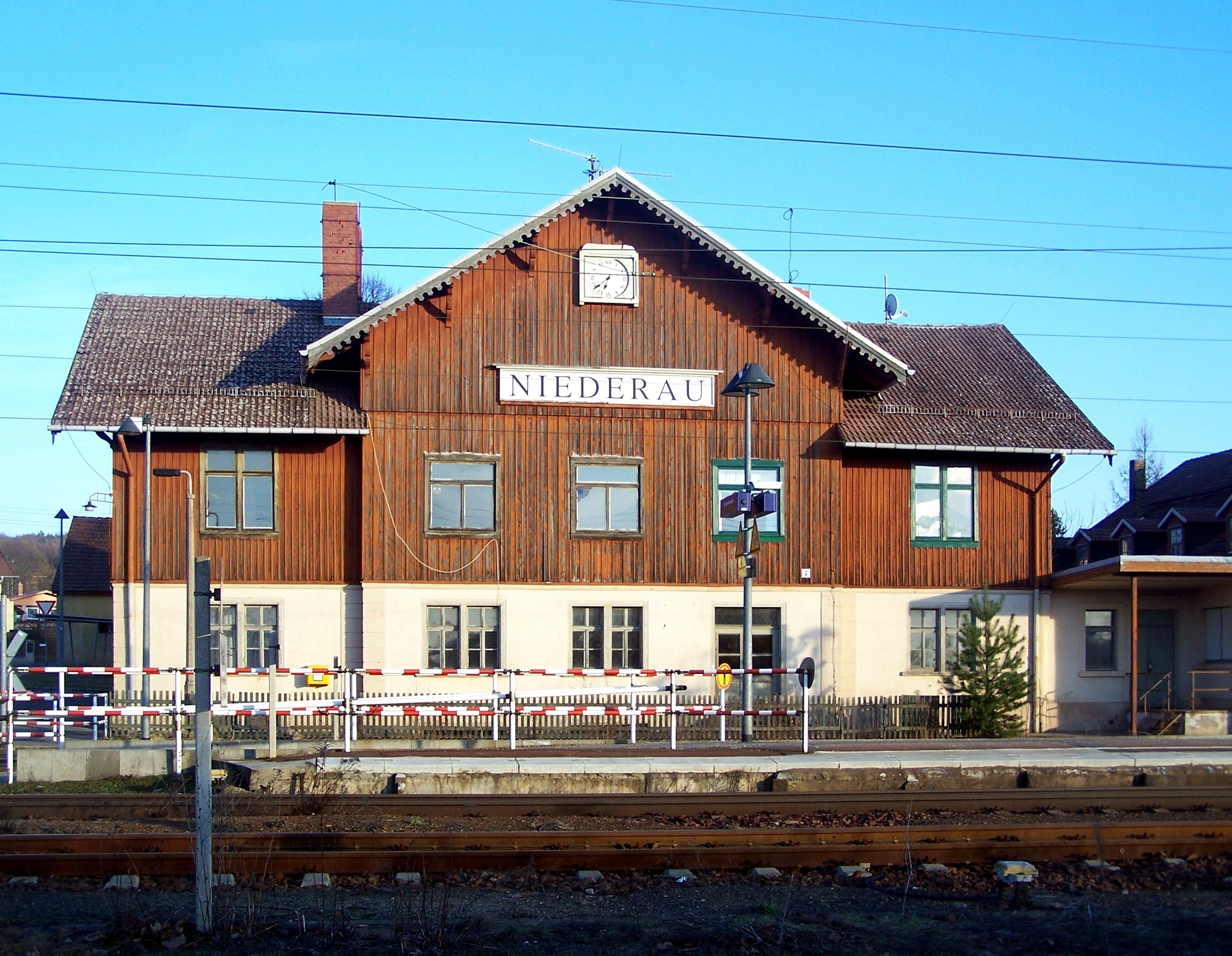 Bahnhof Niederau, Niederau, Landkreis Meißen